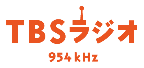 TBSラジオ 旧ロゴ (2006-2015)